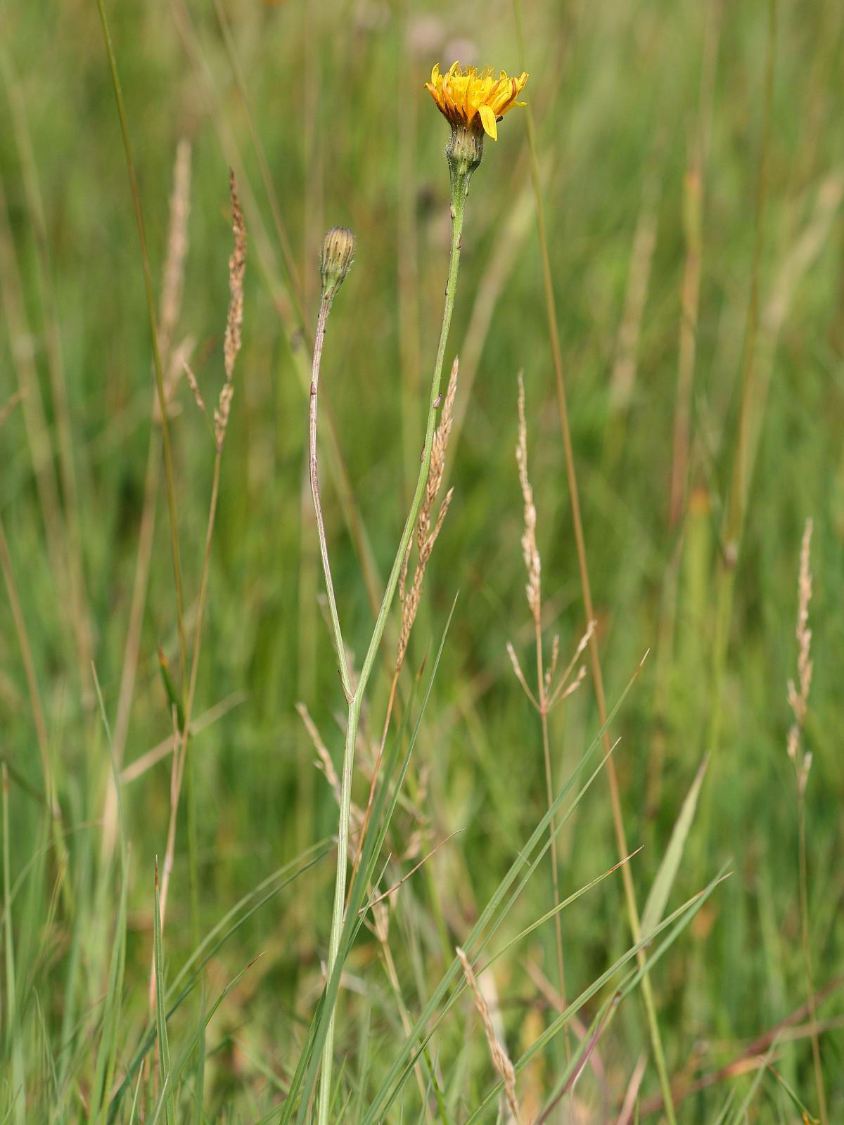 Herbst-Löwenzahn (Leontodon autumnalis)